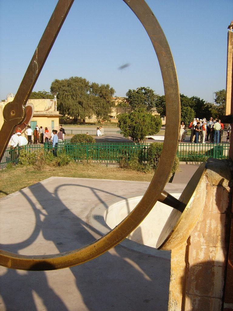 observatoire de Jaipur, le raja Yantra. Novembre 2005. Personal picture, I set it in public domain.